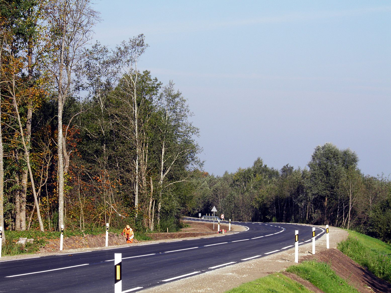 шоссе